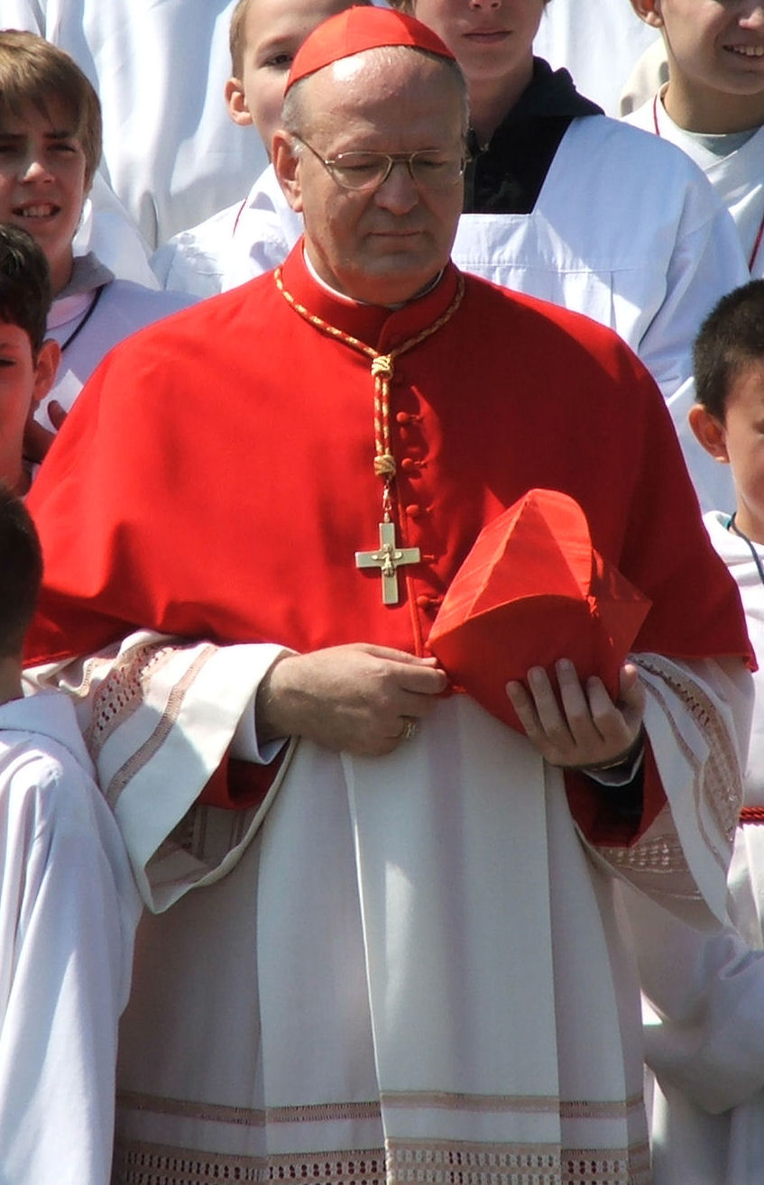 Erdő Péter az esztergomi bazilikában